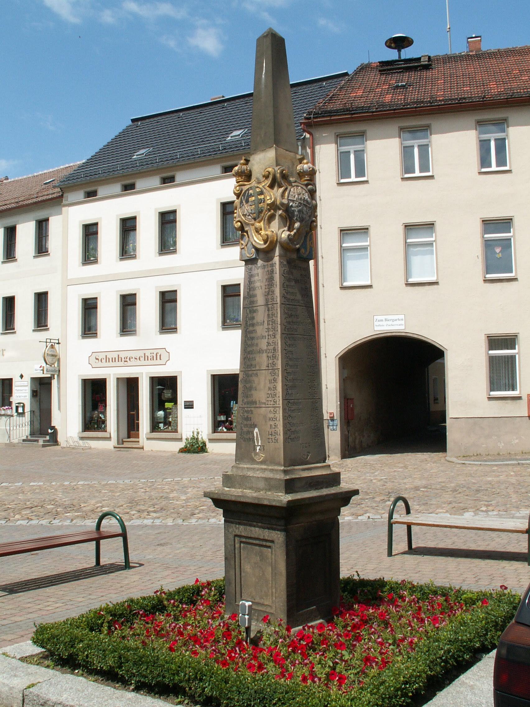 Distanzsäule